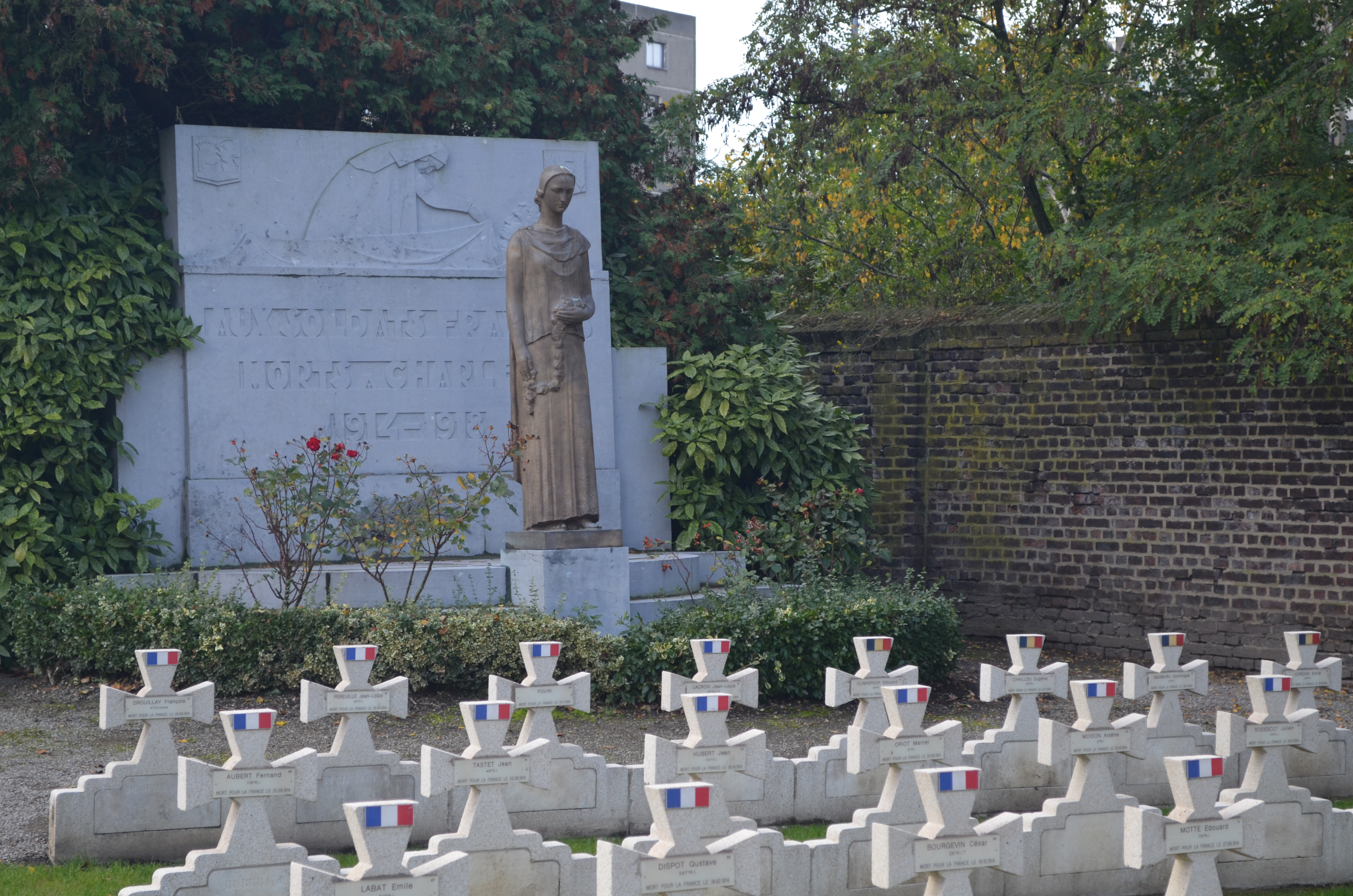 Aux soldats français morts à Charleroi 1914-1918